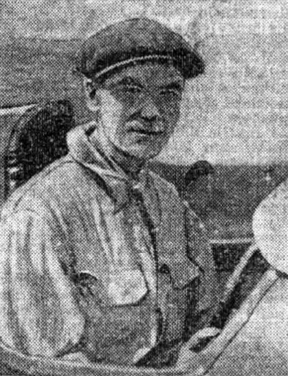 Georges Casse en 1926 (victoire au GP A.C.F. des voiturettes).